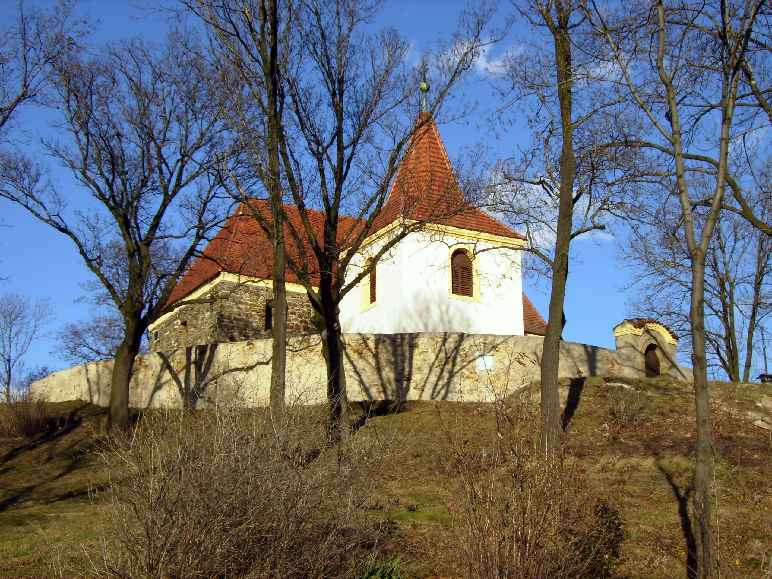 Kostel sv. Bartoloměje na návrší ve středočeském Mochově.